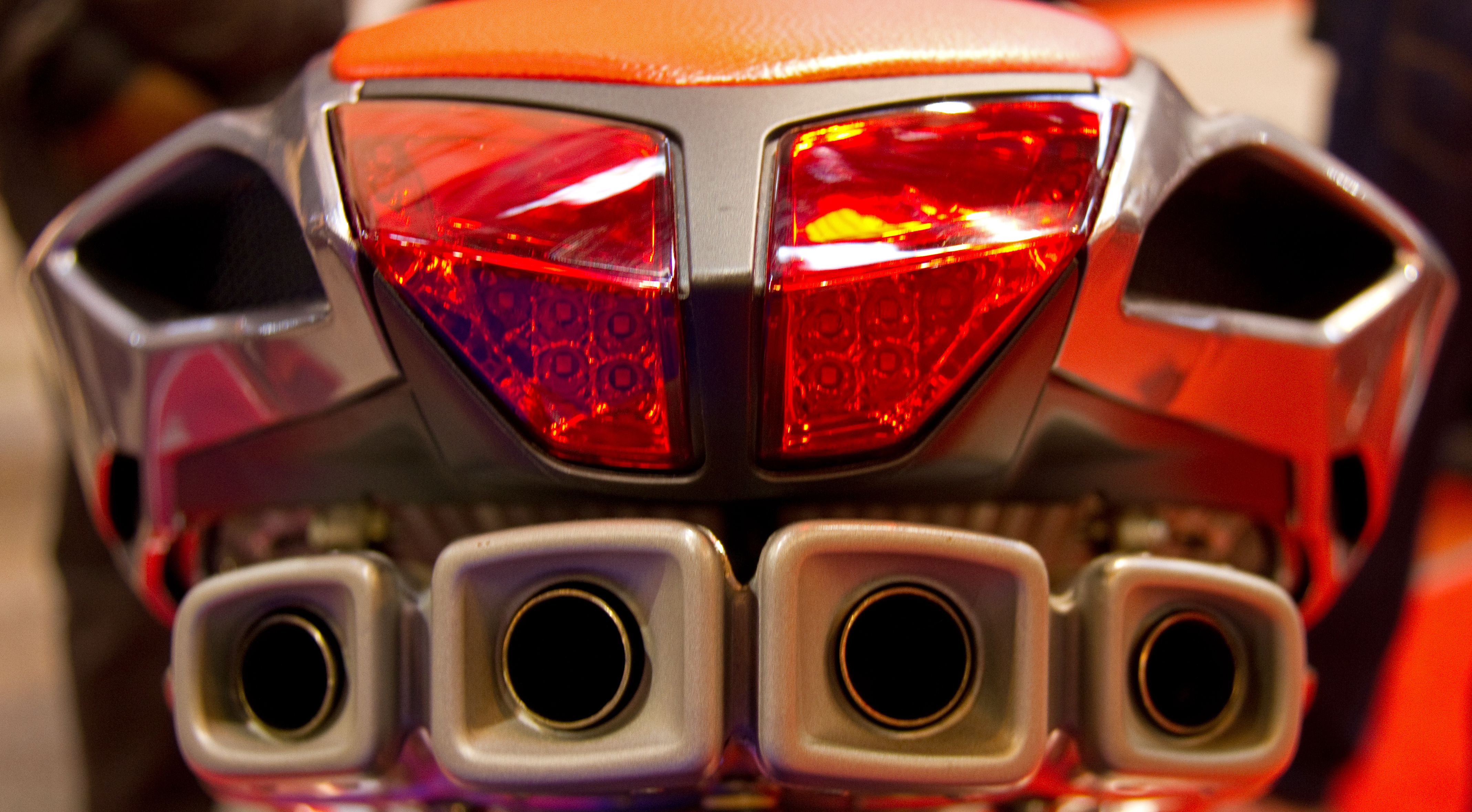 MV Agusta F4R exhausts